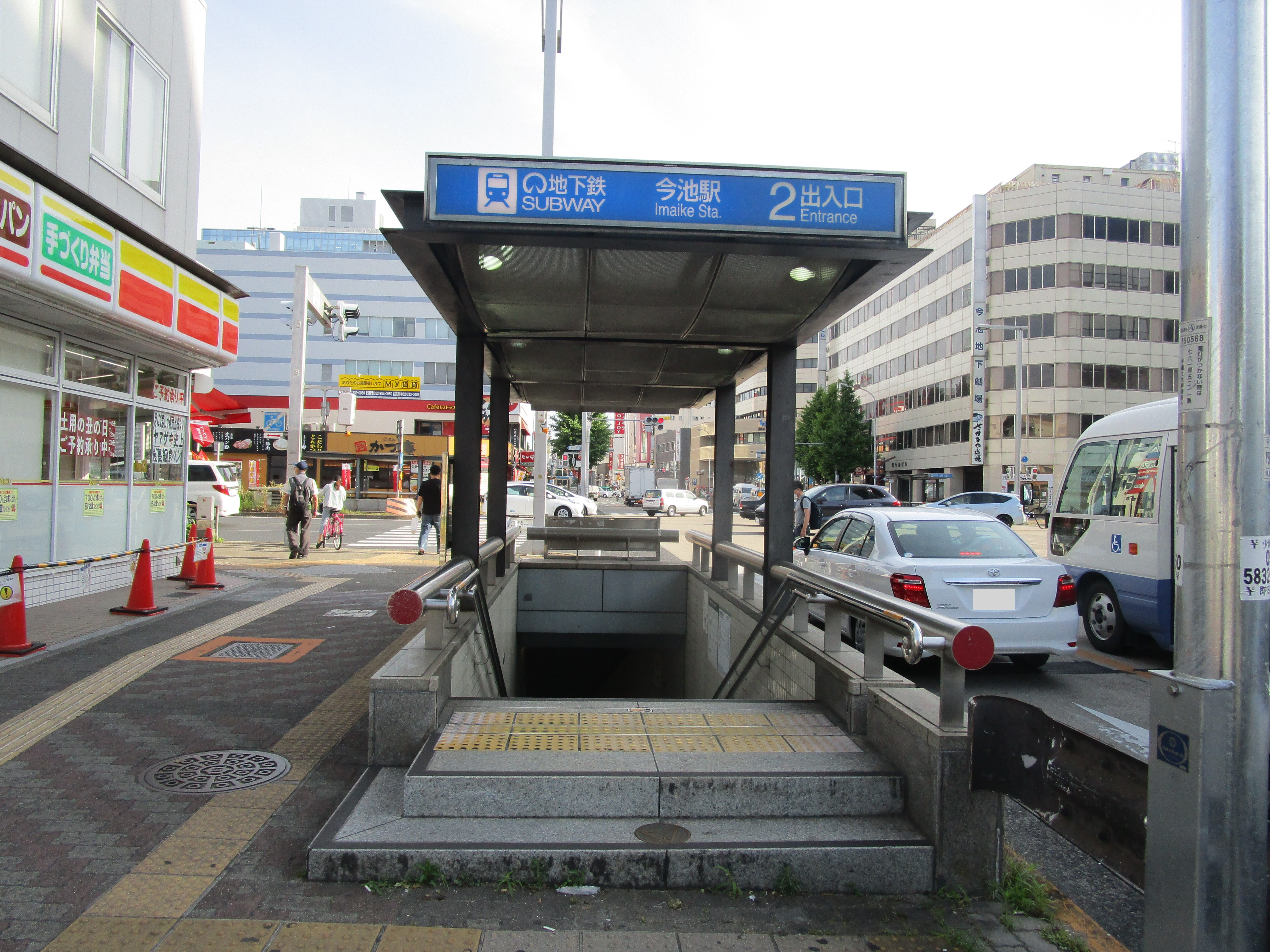 名古屋市営地下鉄今池駅2番出入口